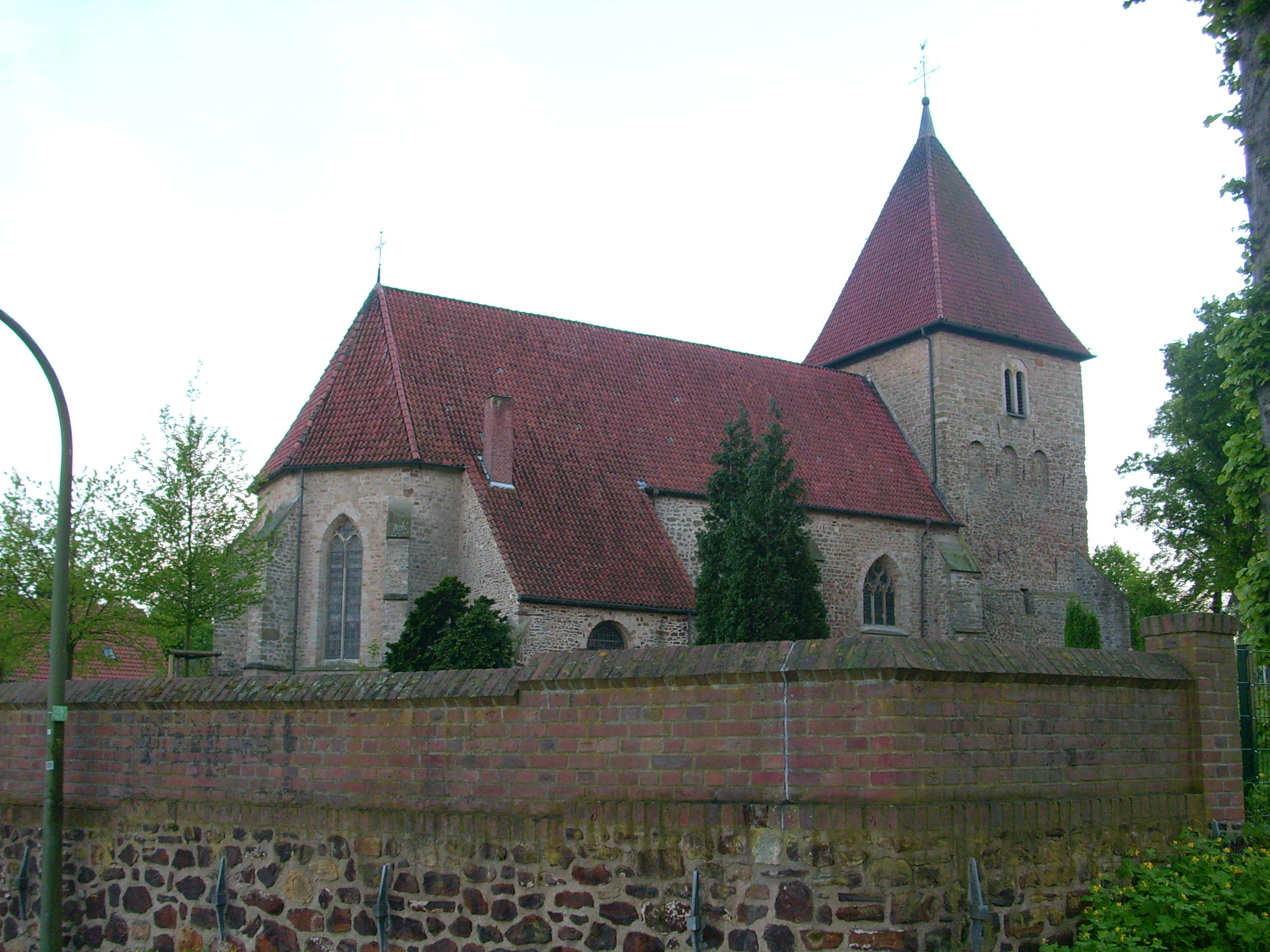 Entspricht der Beschr. der alten Kirche in Wettringen